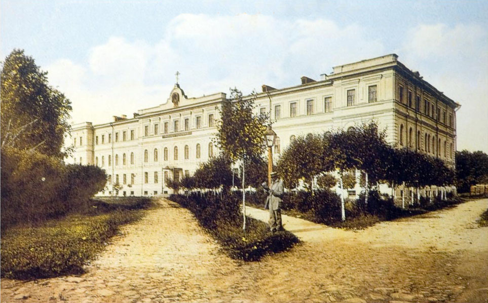 Старый Ярославль. Духовная семинария (ныне Яр. Гос. Педагогический университет)